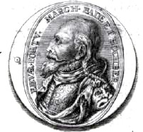 Medaille mit dem Porträt von Eduard Fortunat, Markgraf von Baden-Baden 1588 - 1595